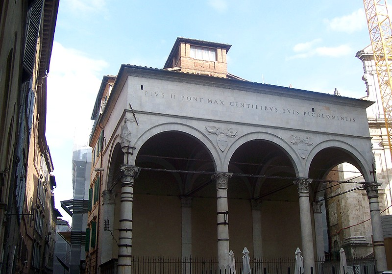 Siena - Logge del Papa